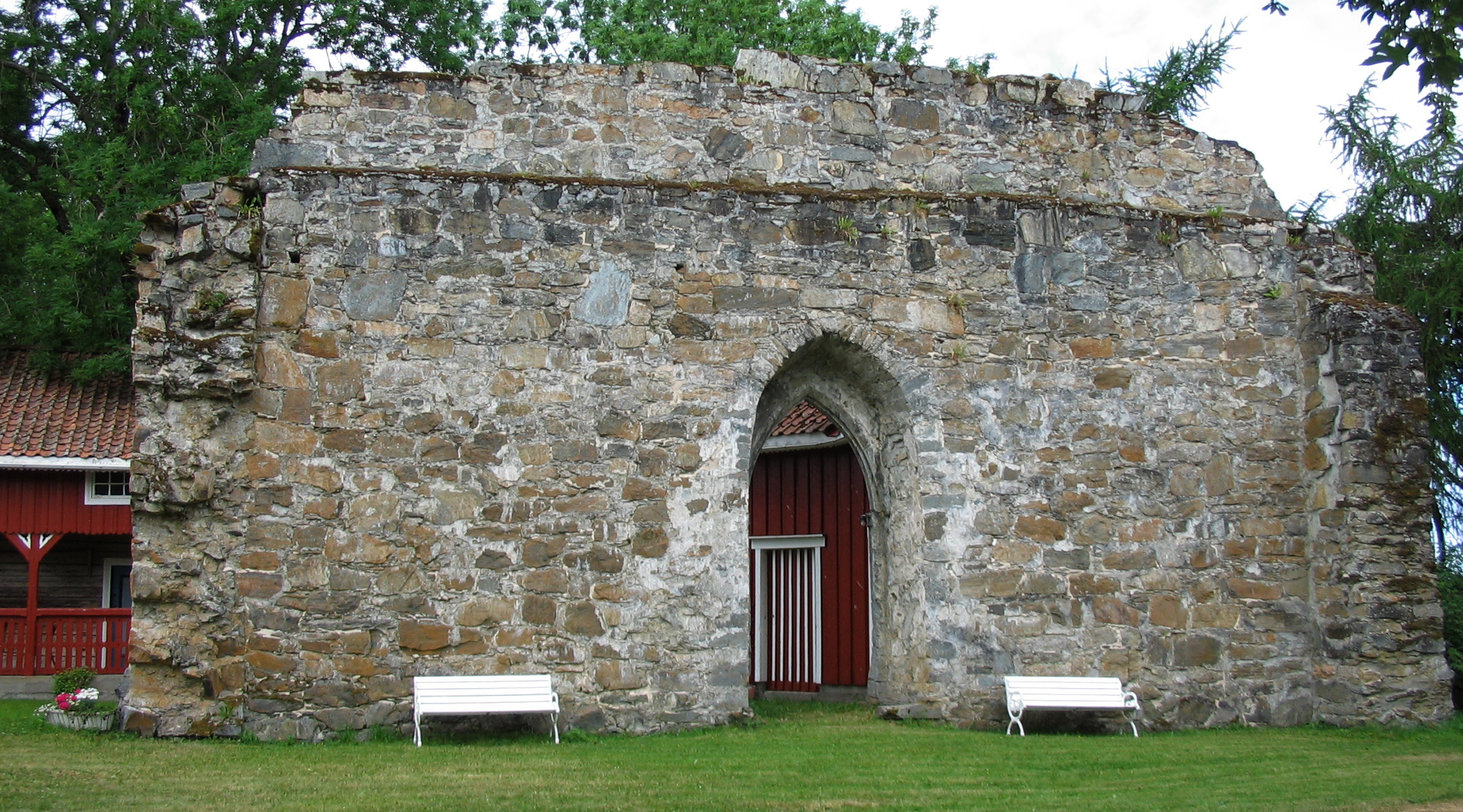 Rein Monastery in Rissa Sør-Trøndelag, Norway